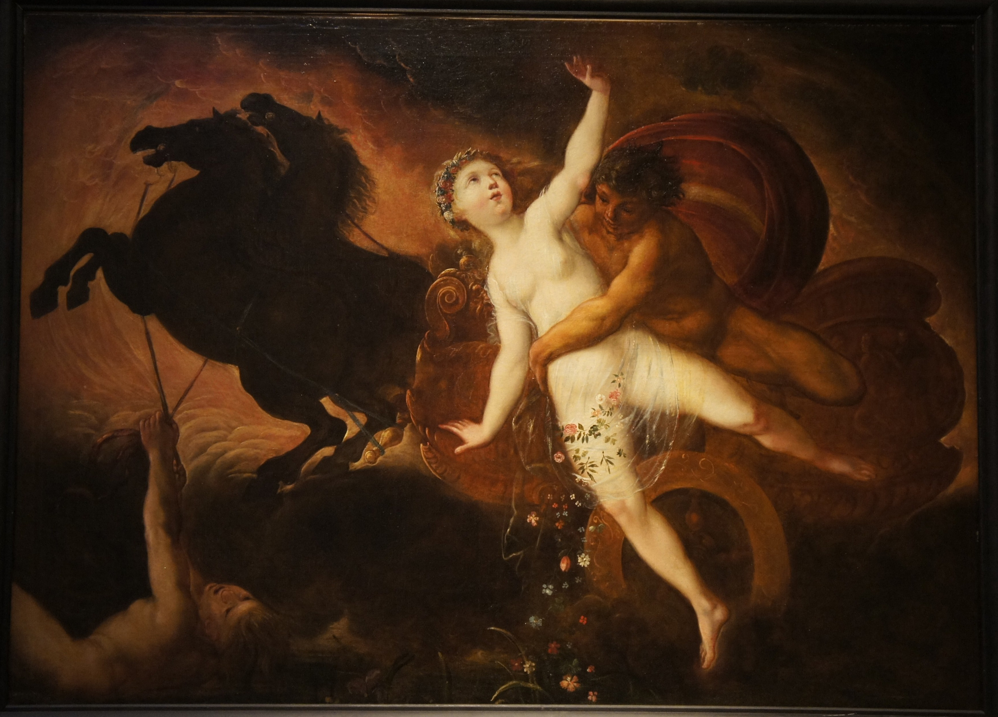 Enlèvemment de Proserpine par P. Brébiette .